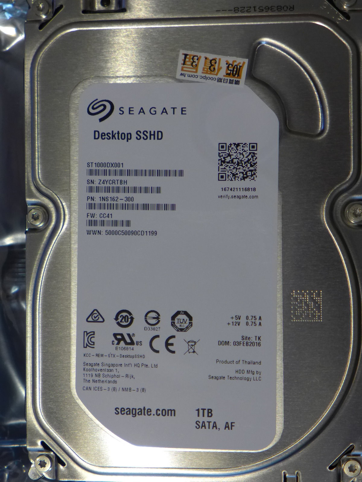 中文（台灣）: 希捷科技SATA混合式硬碟機ST1000DX001正面。